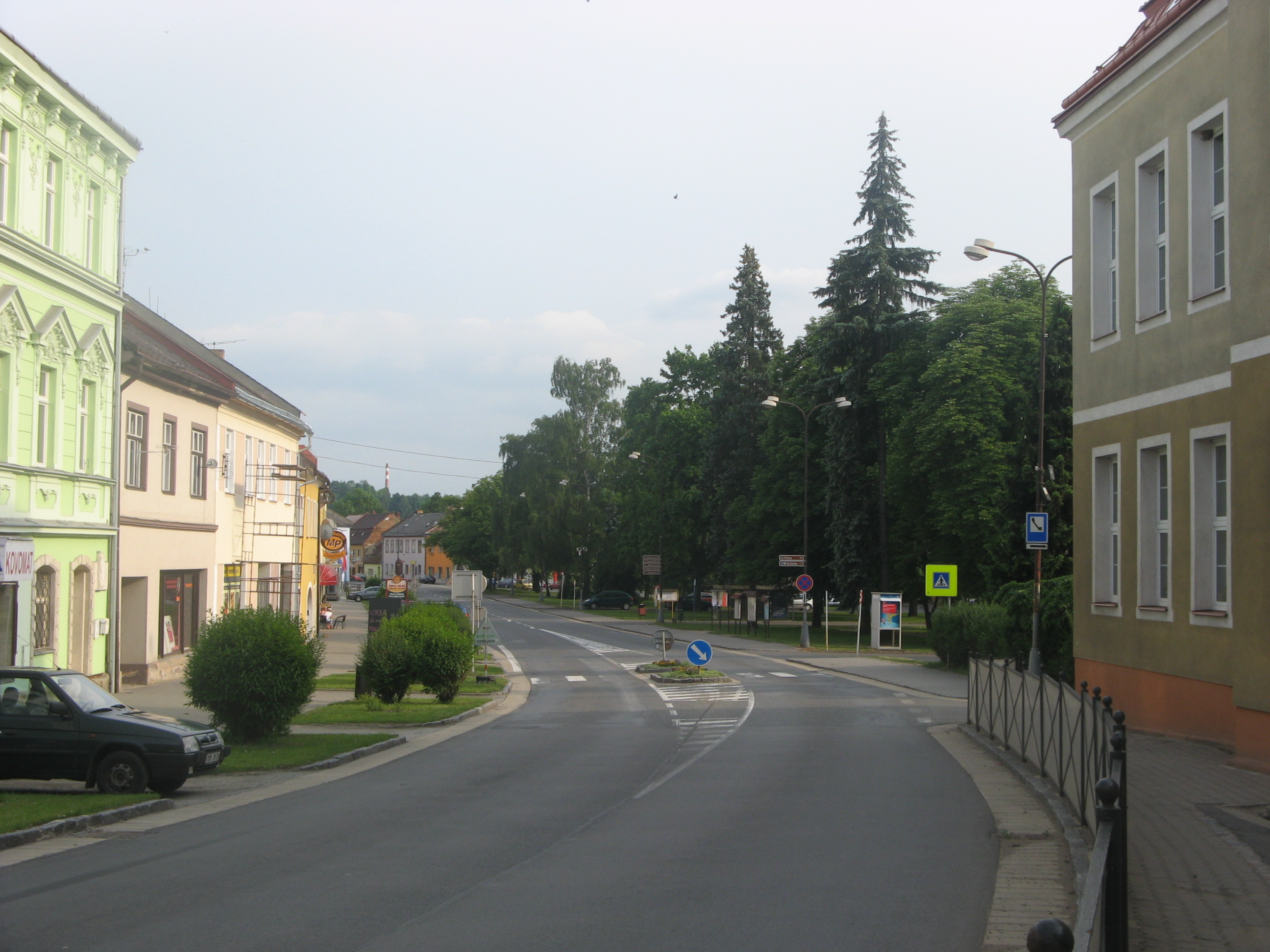 Moravské náměstí, hlavní silnice Brno-Svitavy, zelený dům vlevo je rodný dům Karla Kořistky (1825-1906), Březová n. Svitavou, Czech republic